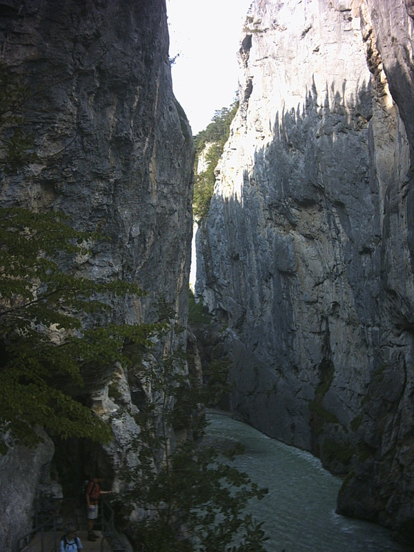 zelf gemaakt in juli 2005